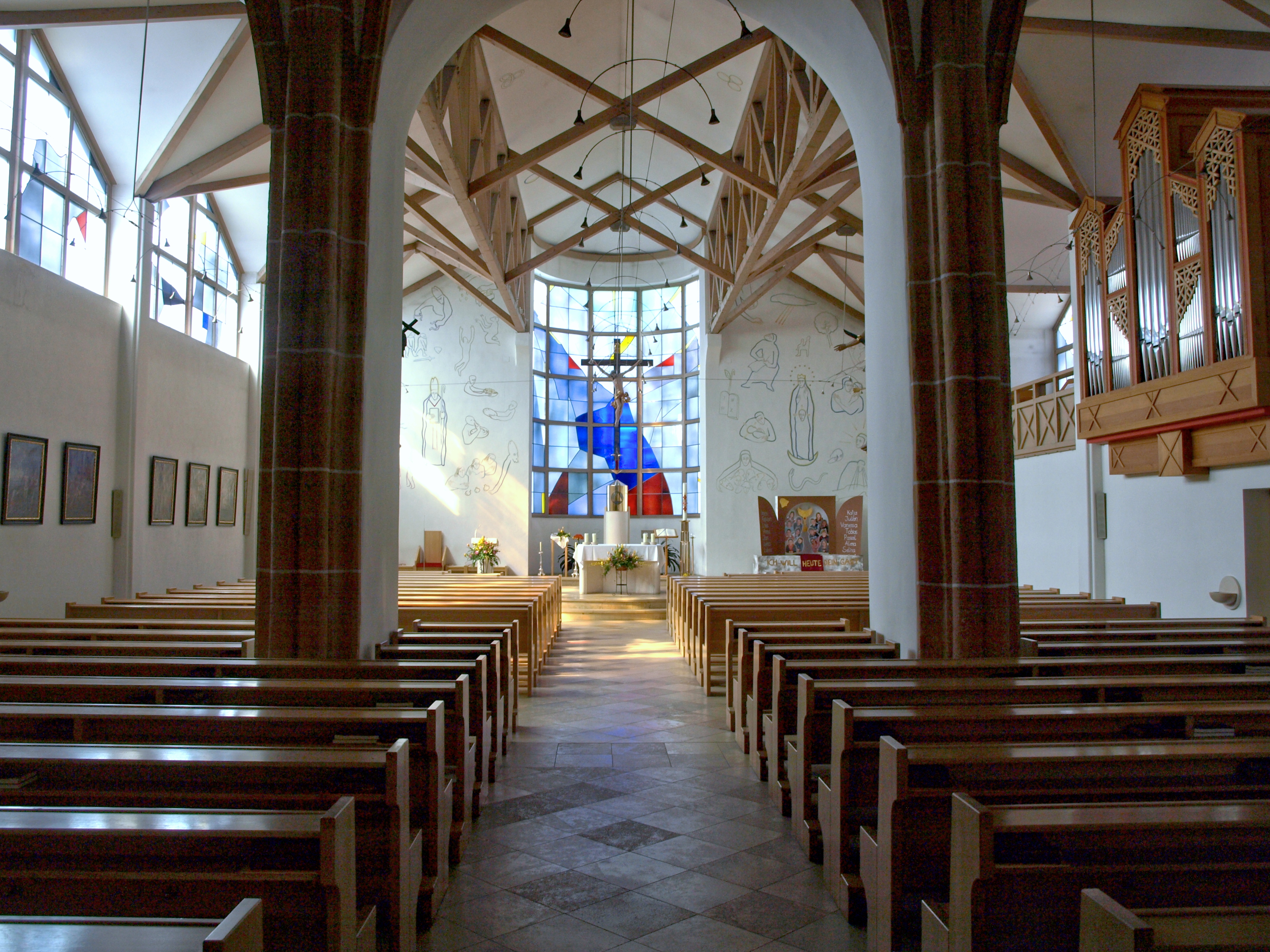 Kath. Pfarrkirche hl. Nikolaus